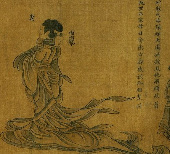 Mujeres Sabias y Benevolentes (detalle) por Ku Kʻai-chih. Copia de la dinastía Sung (960-1279) según la obra original del siglo Ⅳ. Ciudad Prohibida, Pequín.